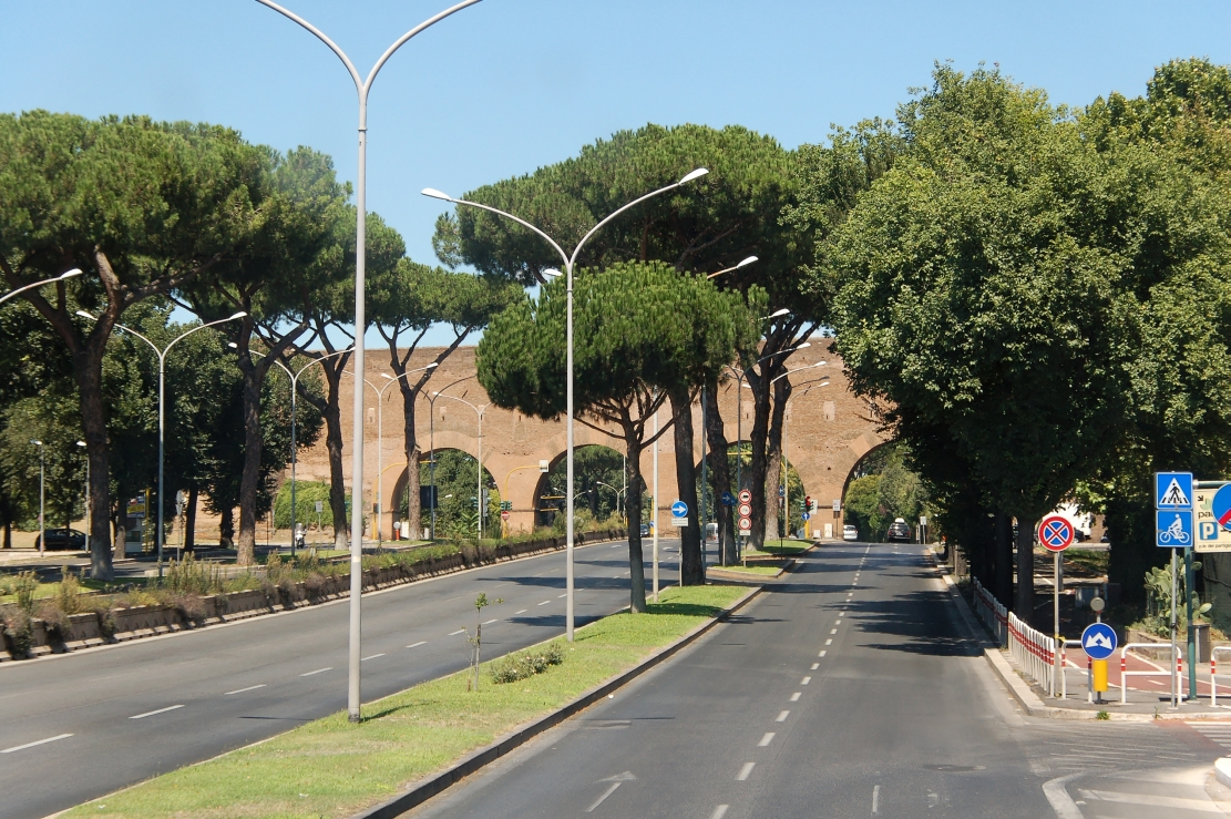 Rom 2011